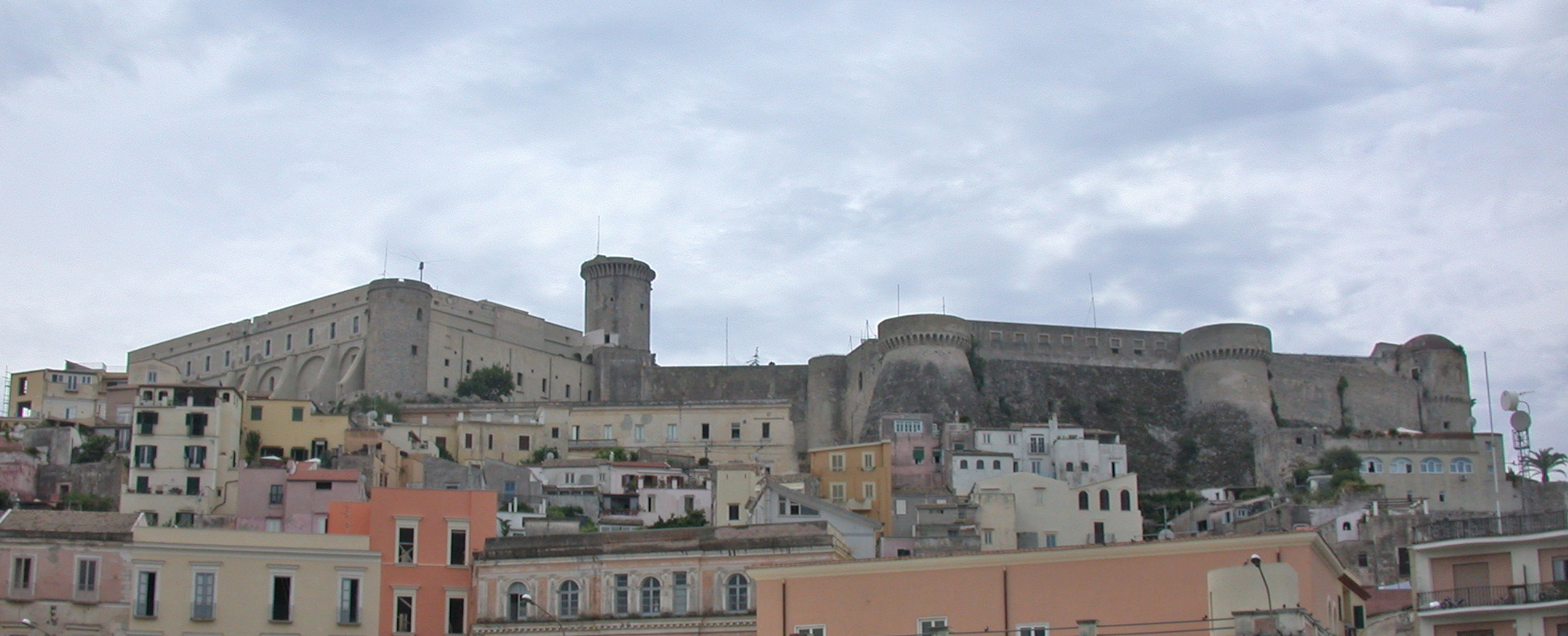 Gaeta (provincia di Latina, Lazio, Italia), panorama del complesso del castello.